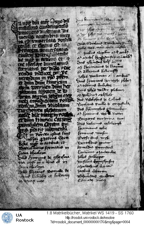 Blatt 1 der Rostocker Matrikel vom Wintersemester 1419/20. Geschrieben vermutlich von dem Universitätssekretär Heinrich Bekelin.